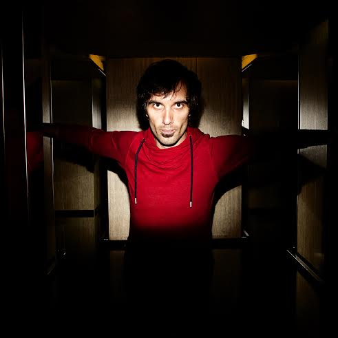 Foto: Martin Babic